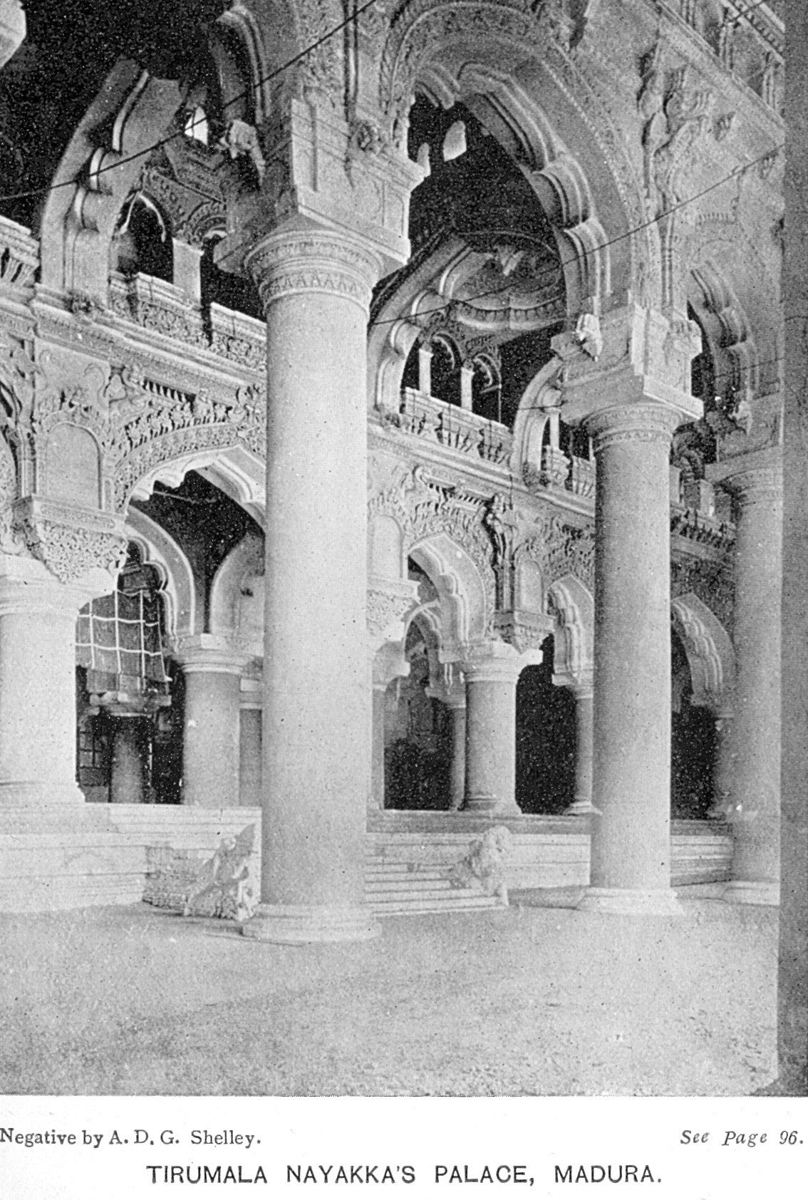 Madura Tirumala Nayakkas Palace